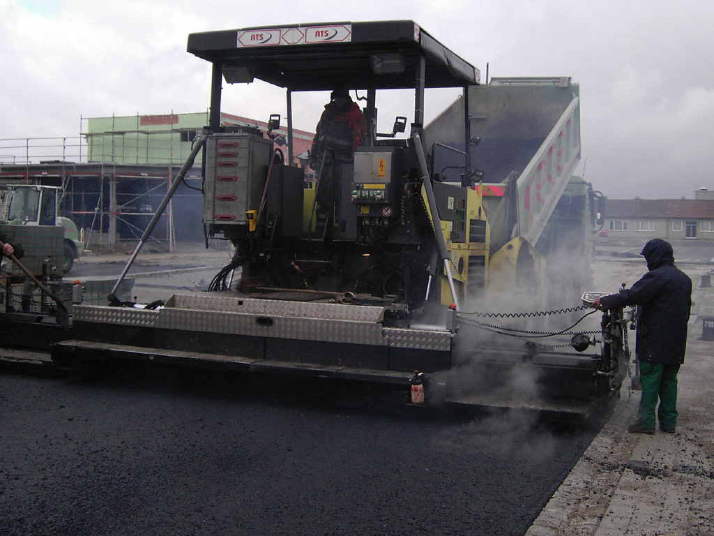 Asphalteinbau mit Straßenfertiger